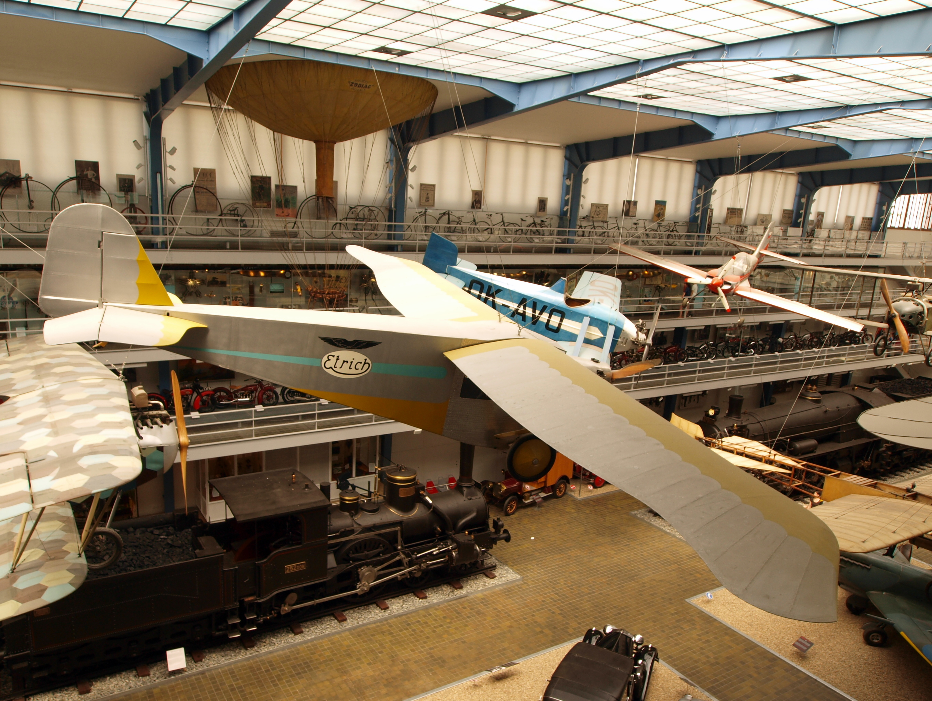 1929 Etrich Sport-Taube